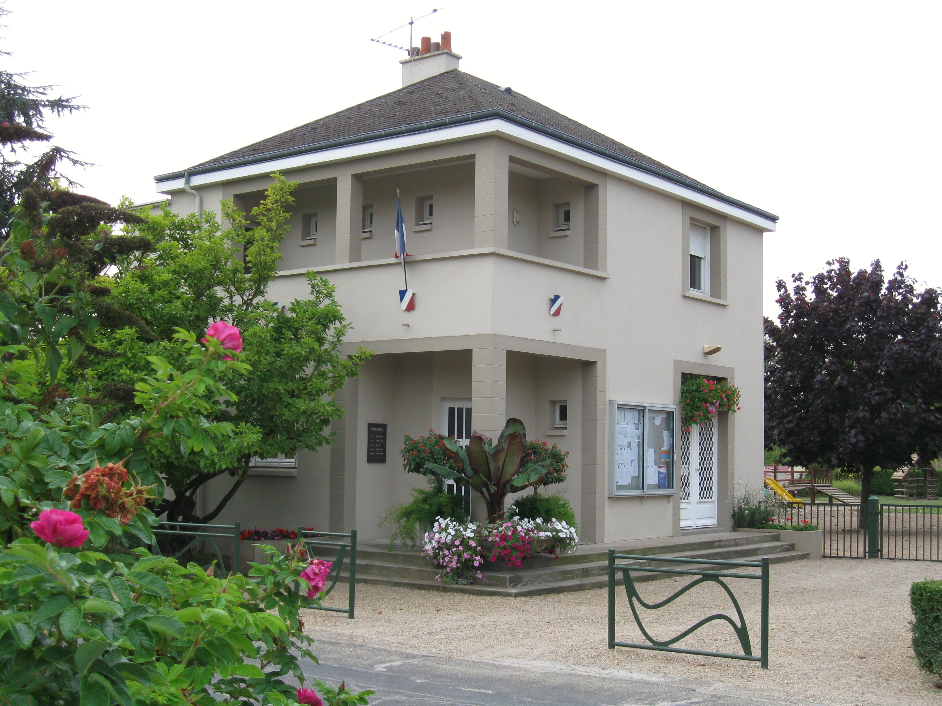 Mairie de Combleux, Loiret, France